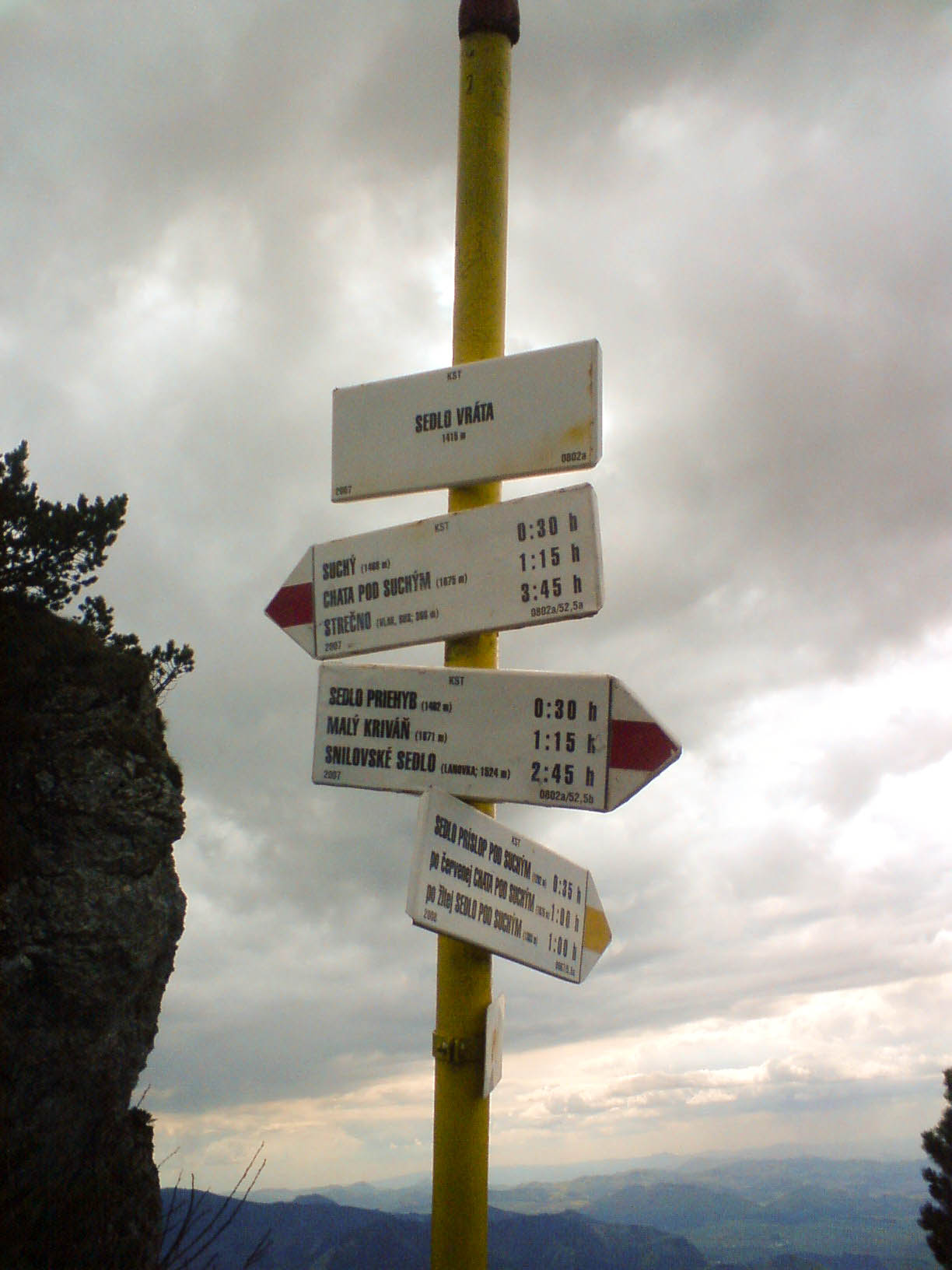 Sedlo Vrátna, Malá Fatra